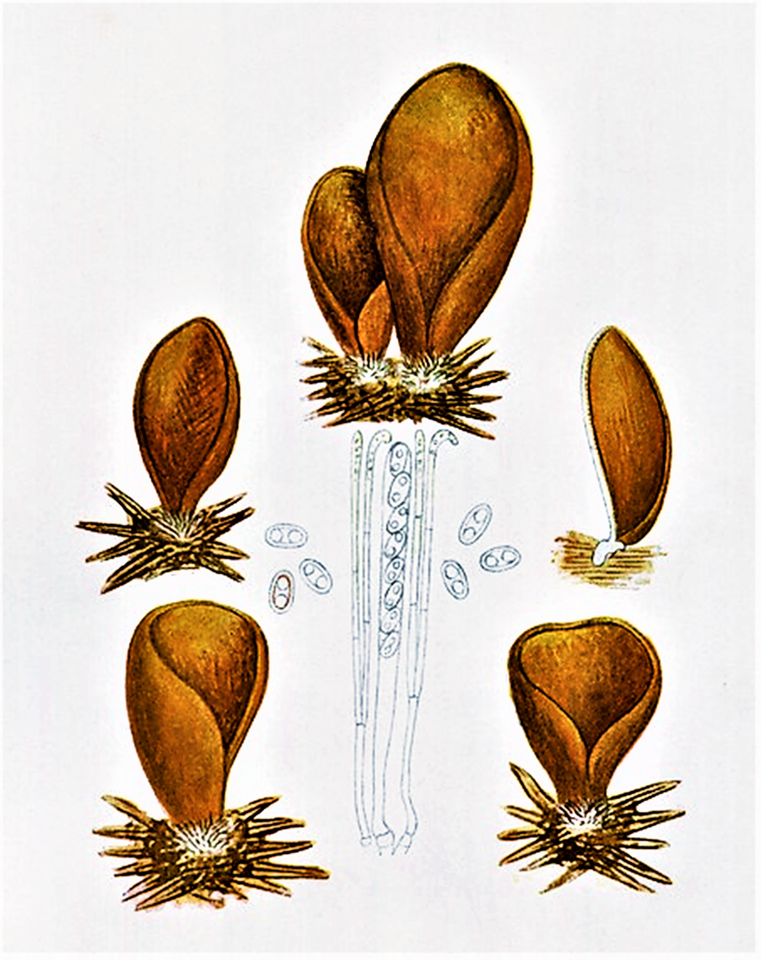 Giacomo Bresadola: Otidea onotica (Batsch, 1783) Fuckel (1870)